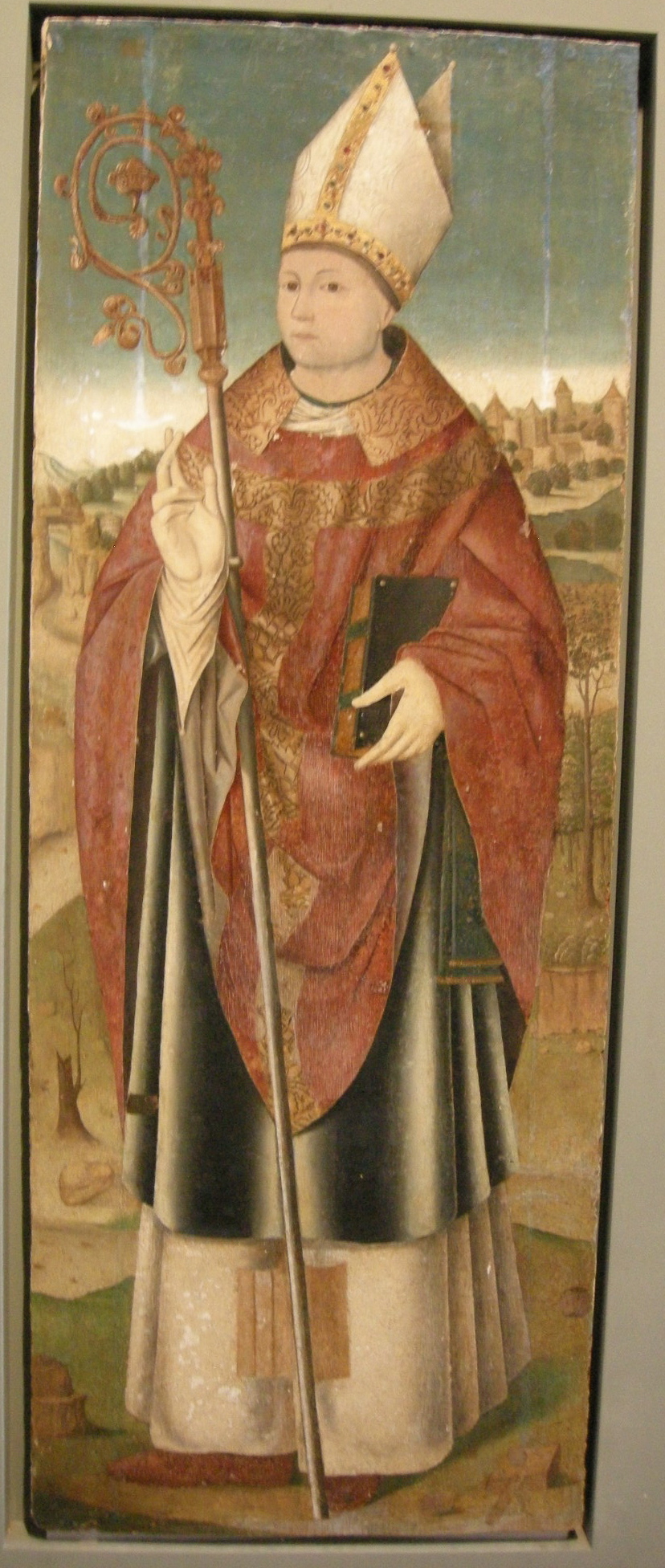 Museo regionale di messina, giovannello da italia, san tommaso di canterbury, 1506